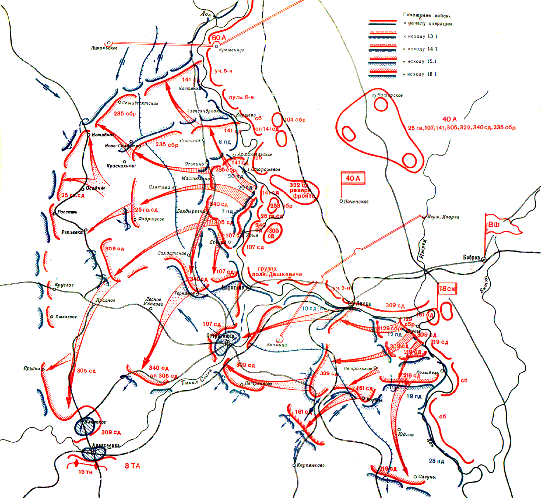 Bản đồ diễn biến cánh Bắc của Chiến dịch Ngôi Sao.